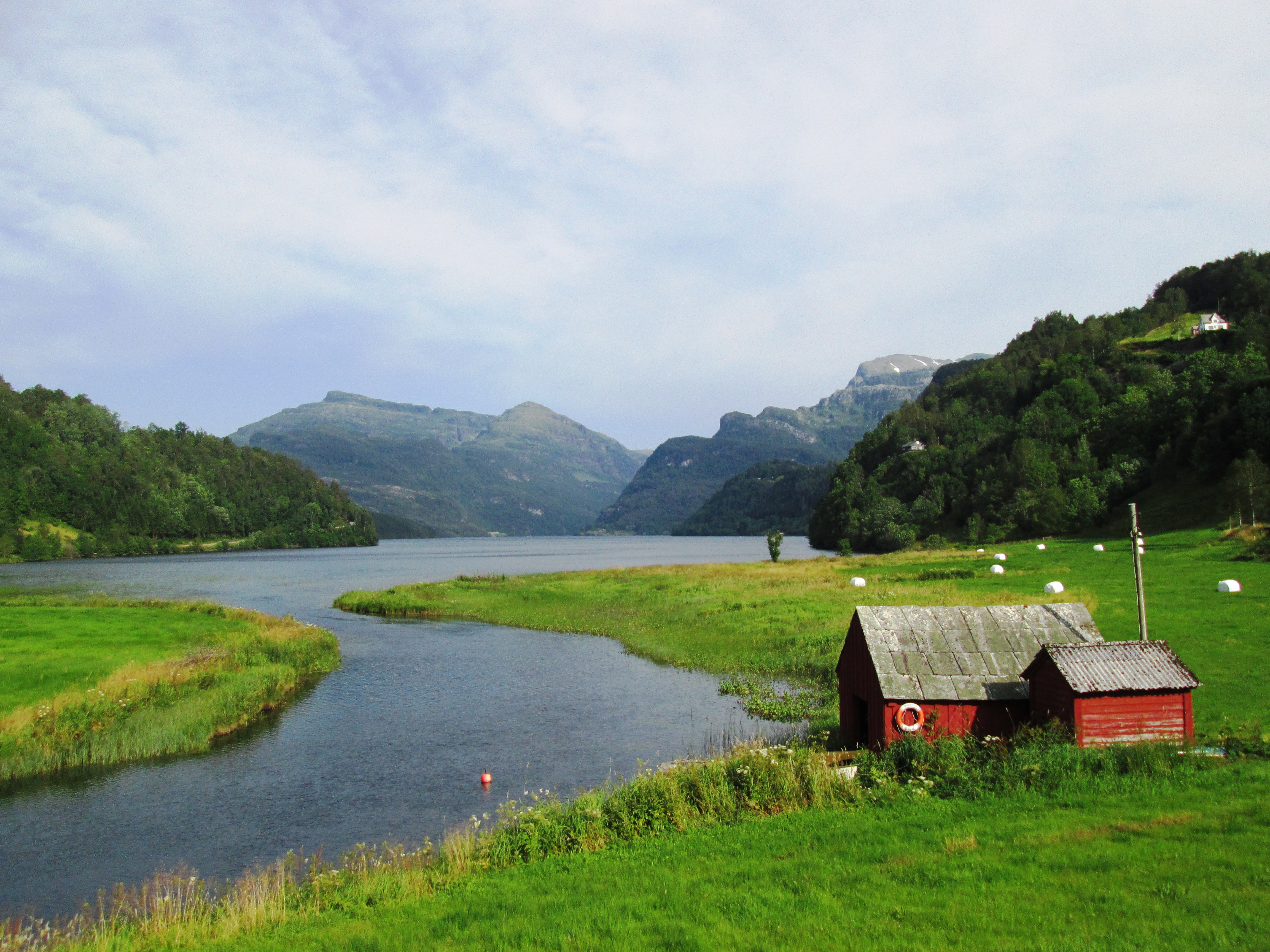 Gjona Lake, Norway 3